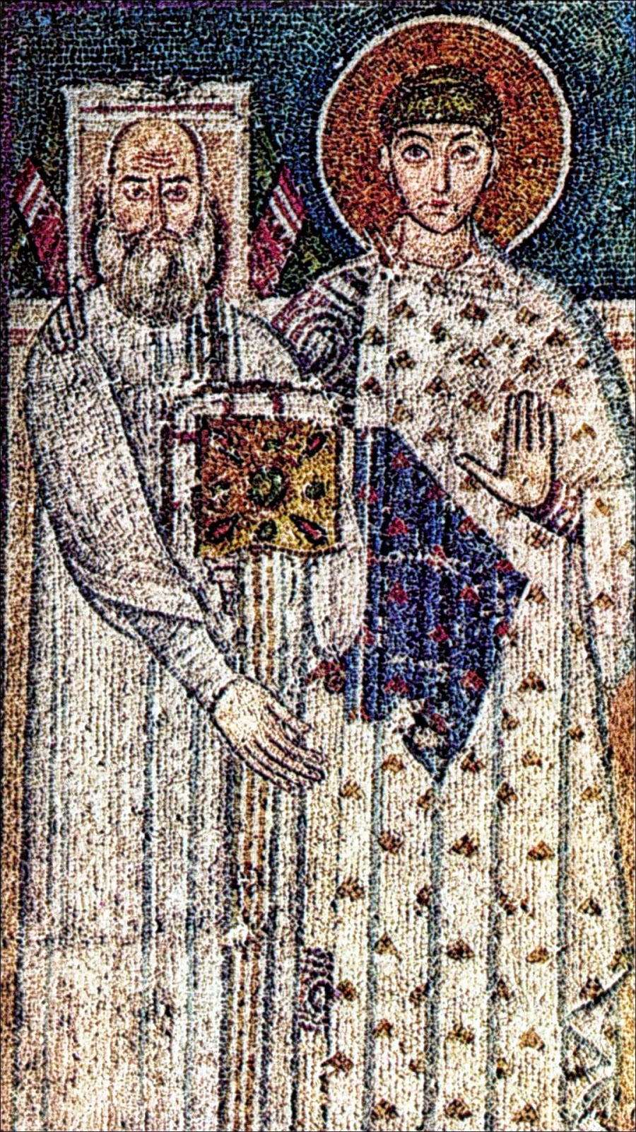 Άγιος Δημήτριος Άγιος Δημήτριος Θεσσαλονίκης. Ψηφιδωτό 7ου αιώνα